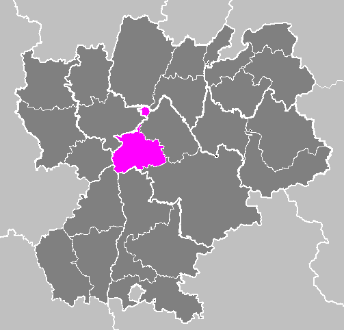 Maps of arrondissements and cantons of France: Arrondissement de Vienne.PNG (Région Rhône-Alpes)